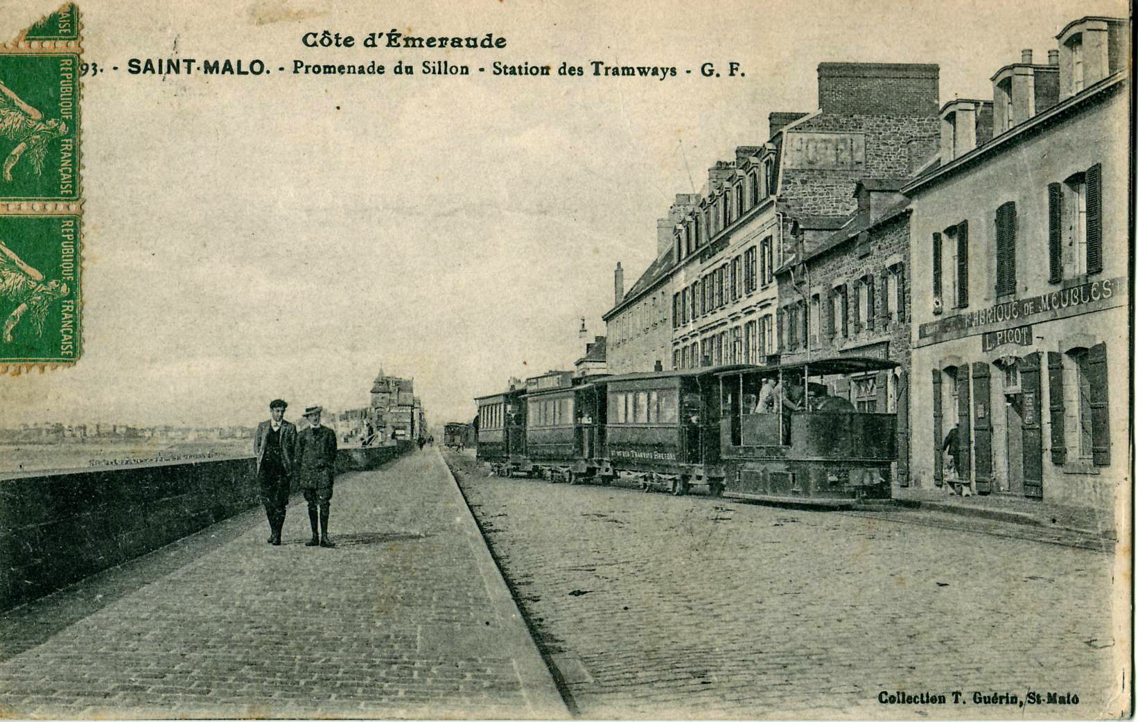 Carte postale ancienne éditée par T. Guérin à Saint-Malo, n°??93Côte d'Emeraude - SAINT-MALO - Promenade du Sillon - Station des Tramways